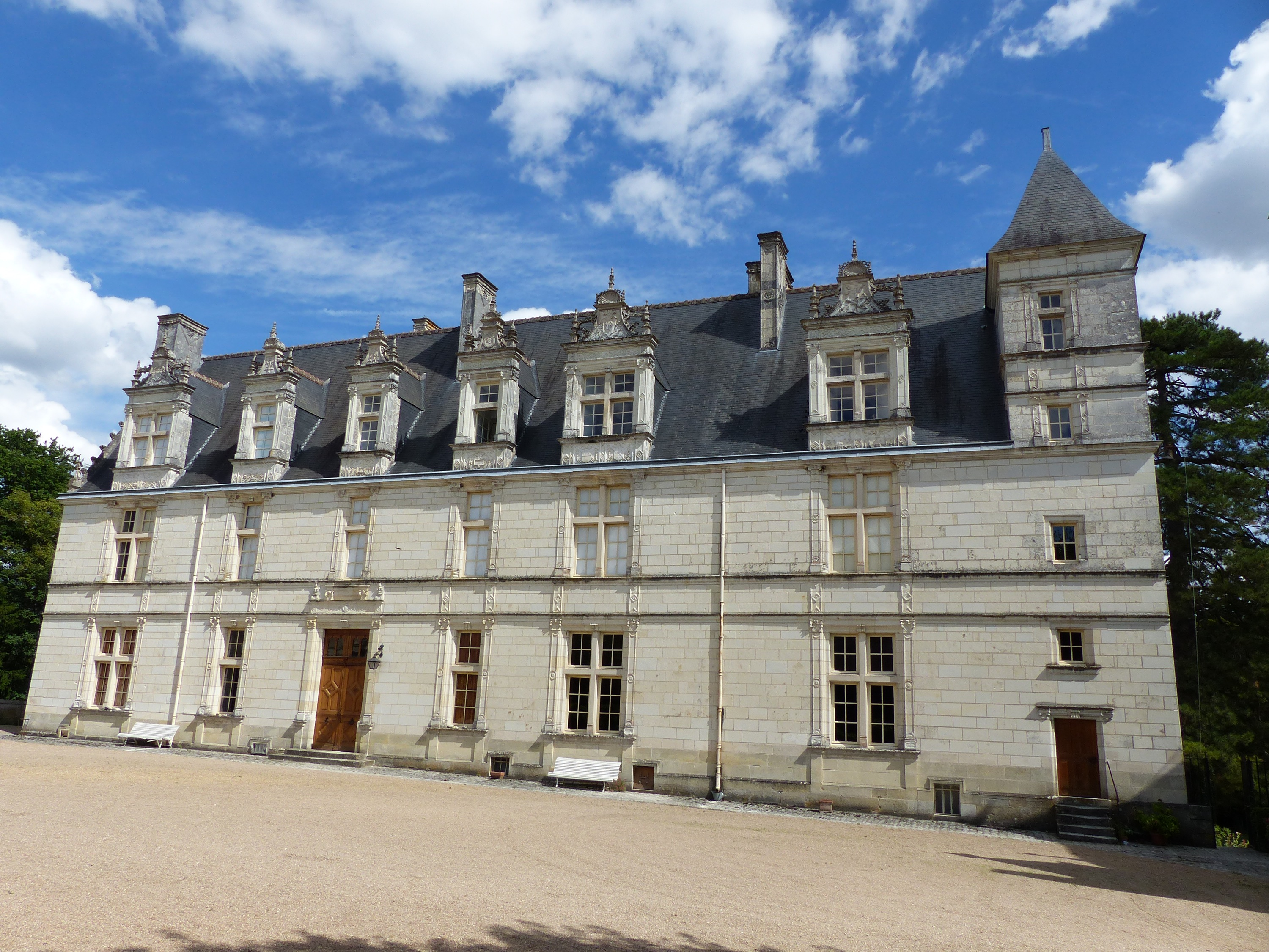 Château de Nitray, façade principale (1516) .